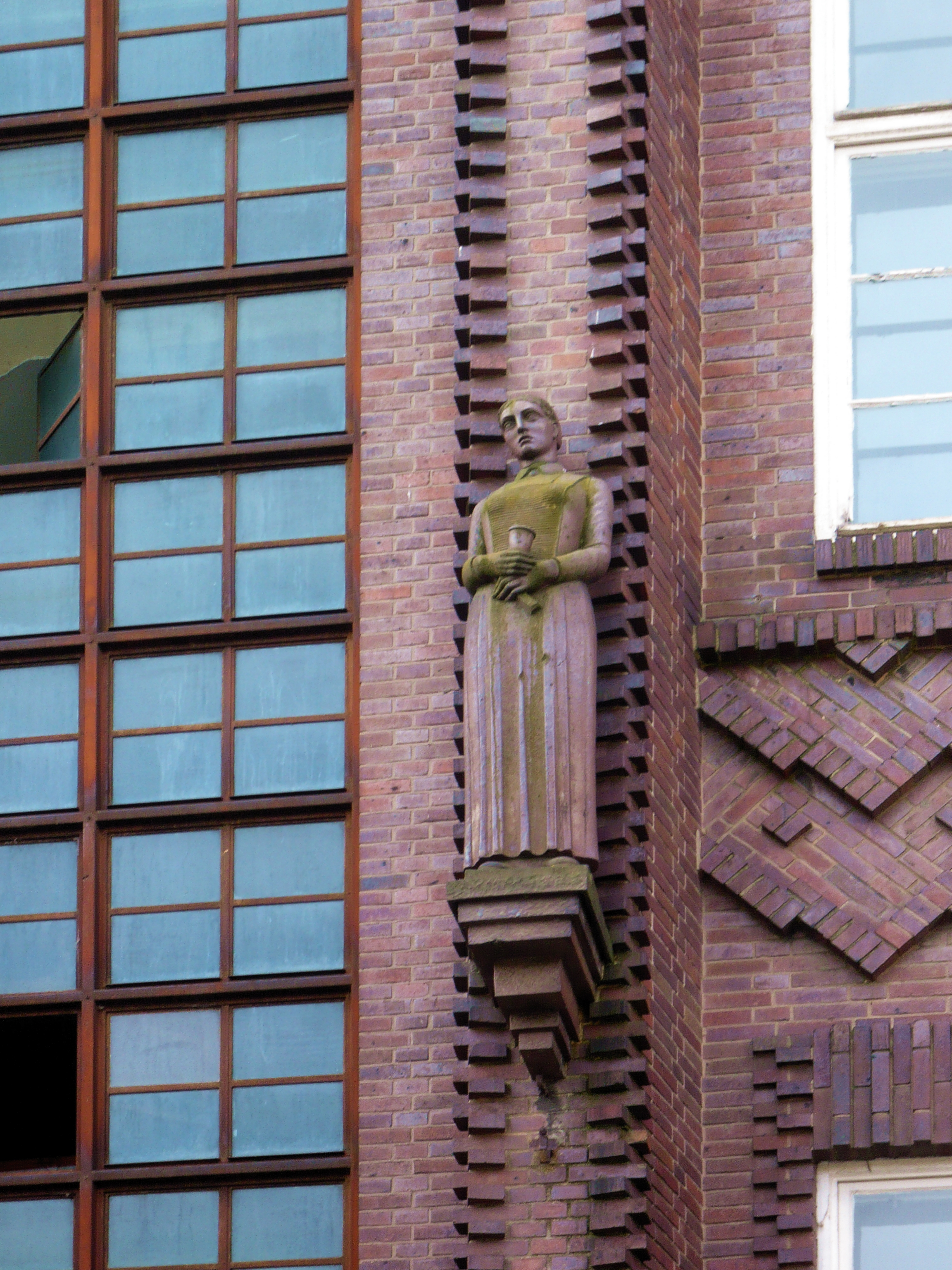 Berlin-Mitte, Haus am Köllnischen Park / Rungestraße